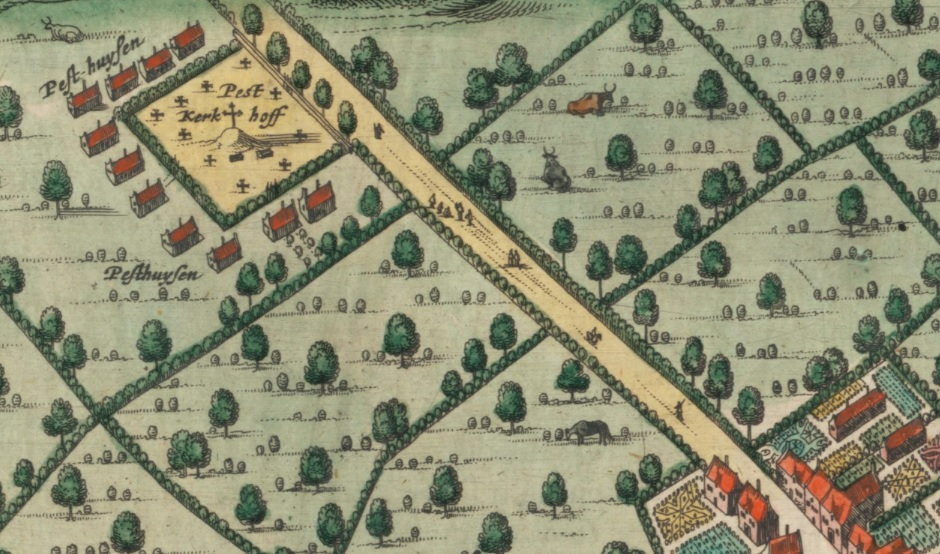 Pesthuizen en pestkerkhof (detail op de kaart van Steenvoorde - Flandria Illustrata - 1641)